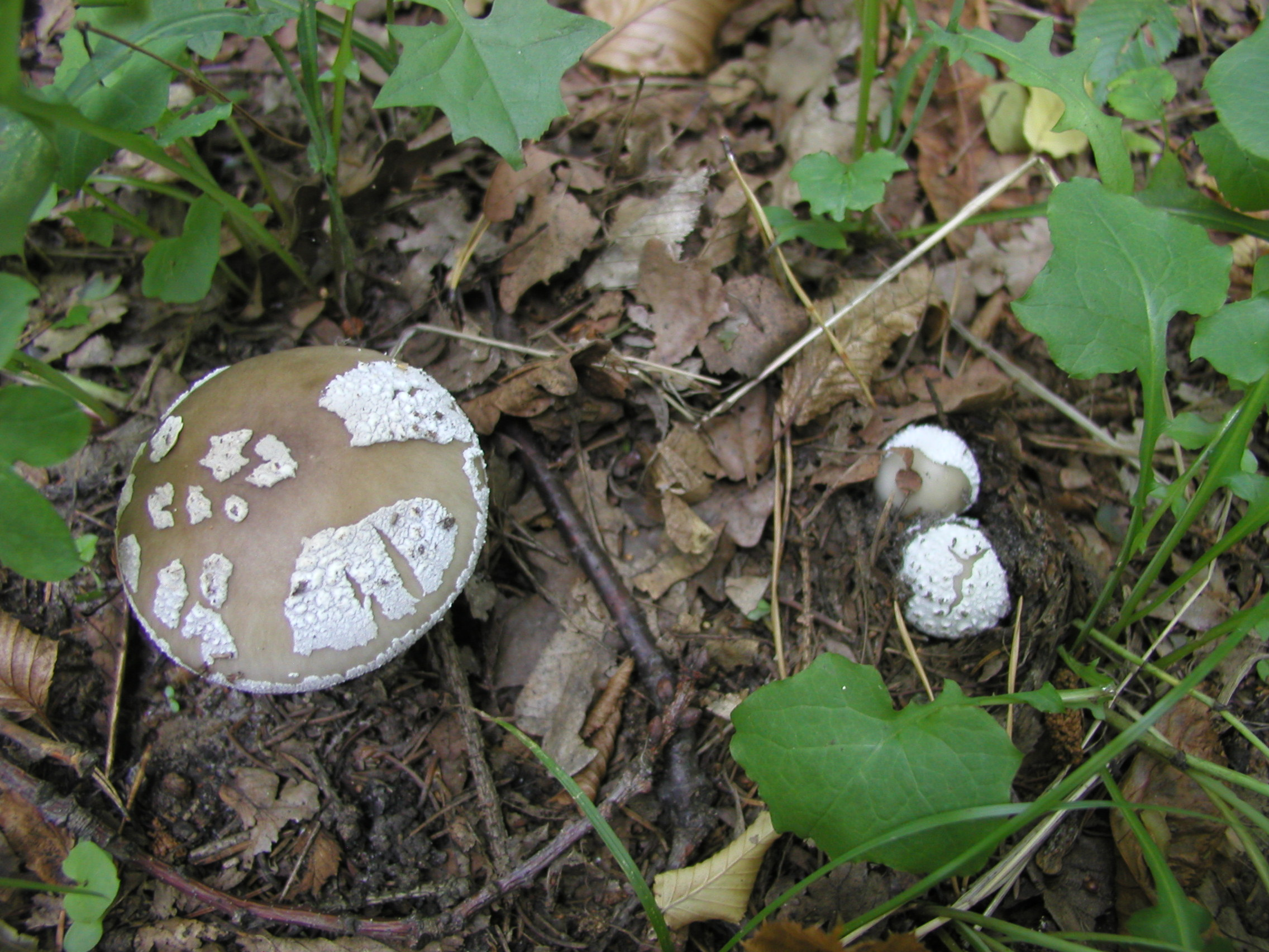 Muchomor twardawy Amanita spissa (syn. a. excelsa)